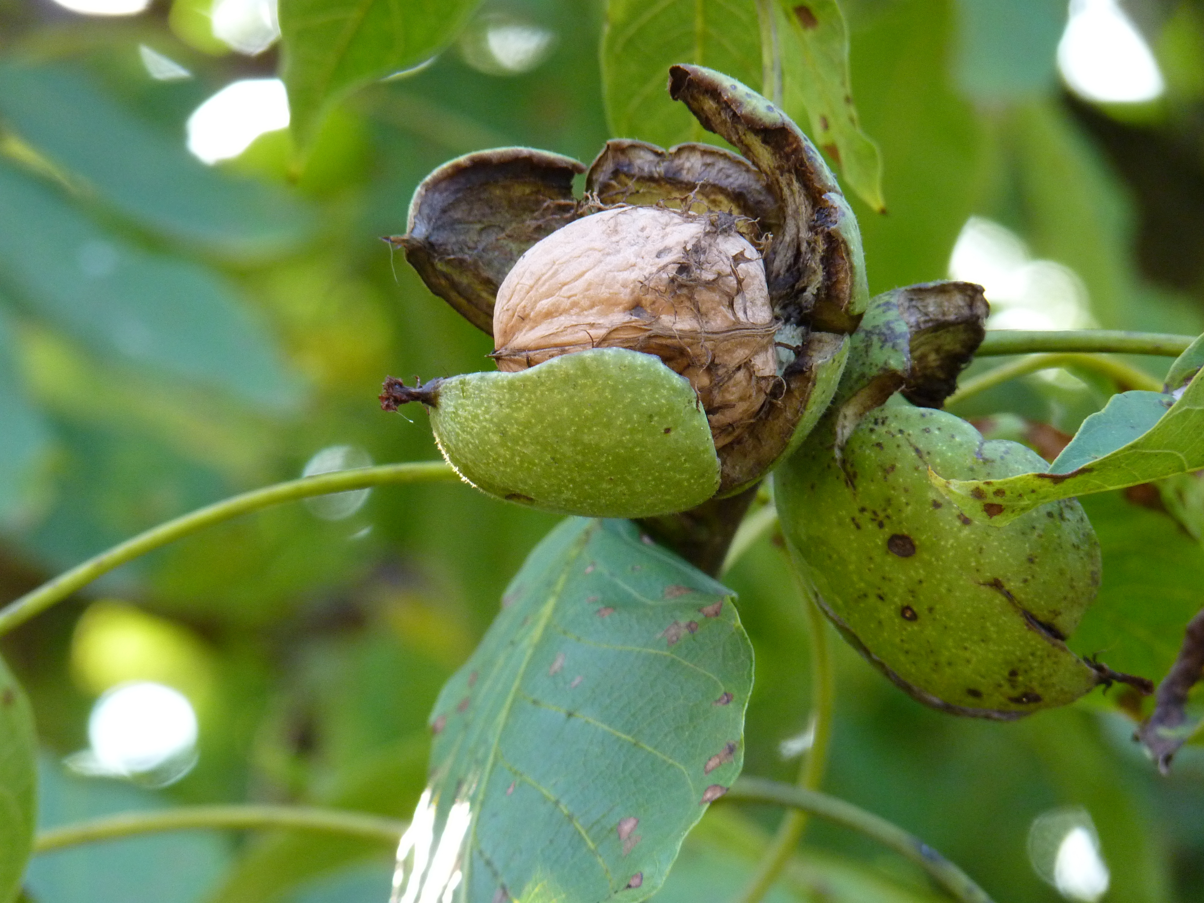 Noix encore dans son enveloppe, prête à tomber.